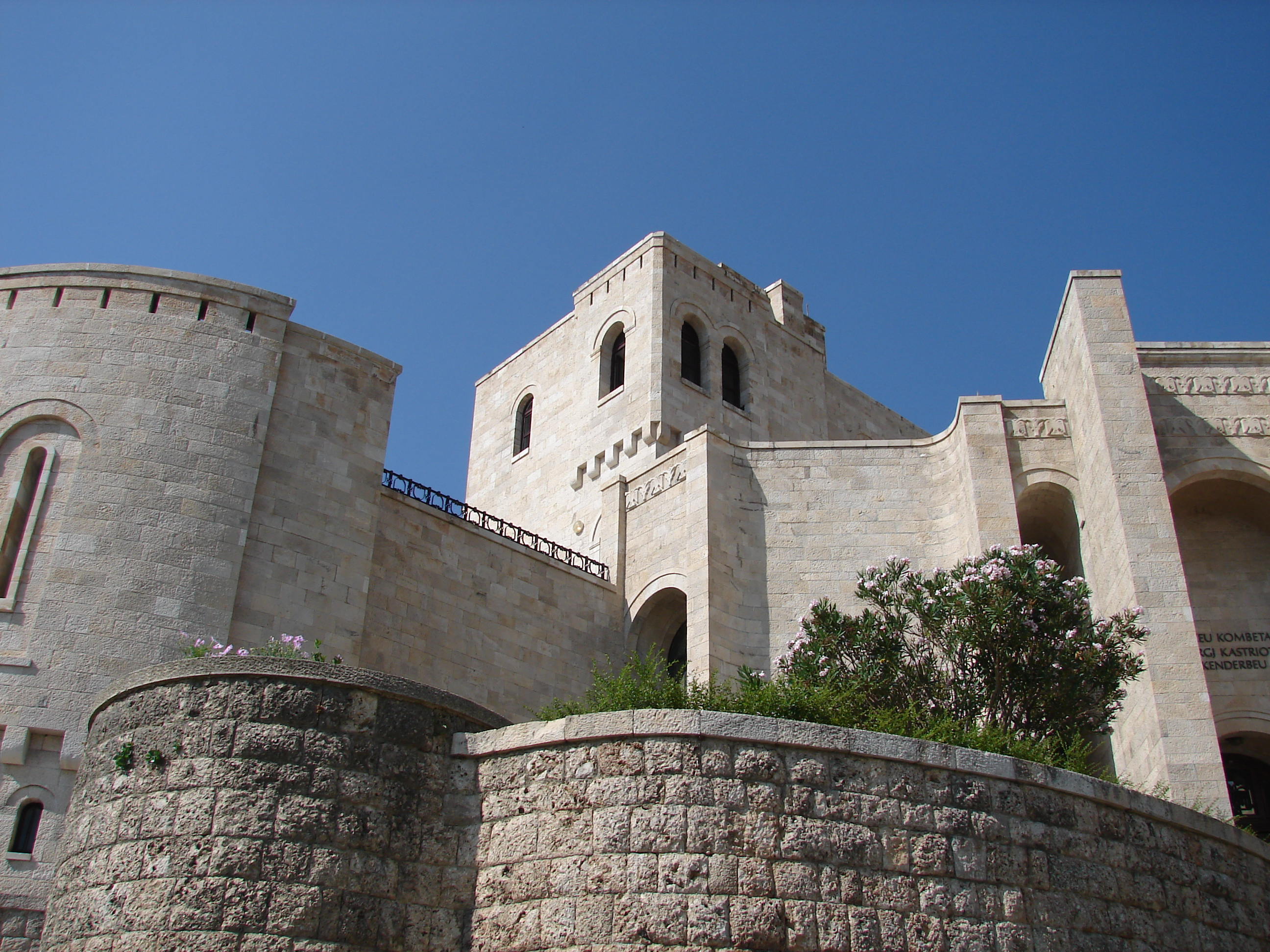 Skanderbeg Museum in Kruja, Albania